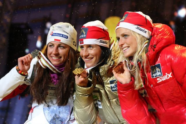 Justyna Kowalczyk, Marit Bjørgen i Therese Johaug podczas ceremonii medalowej po biegu indywidualnym kobiet na 15 kilometrów w ramach Mistrzostw Świata w Narciarstwie Klasycznym 2011 w Oslo.